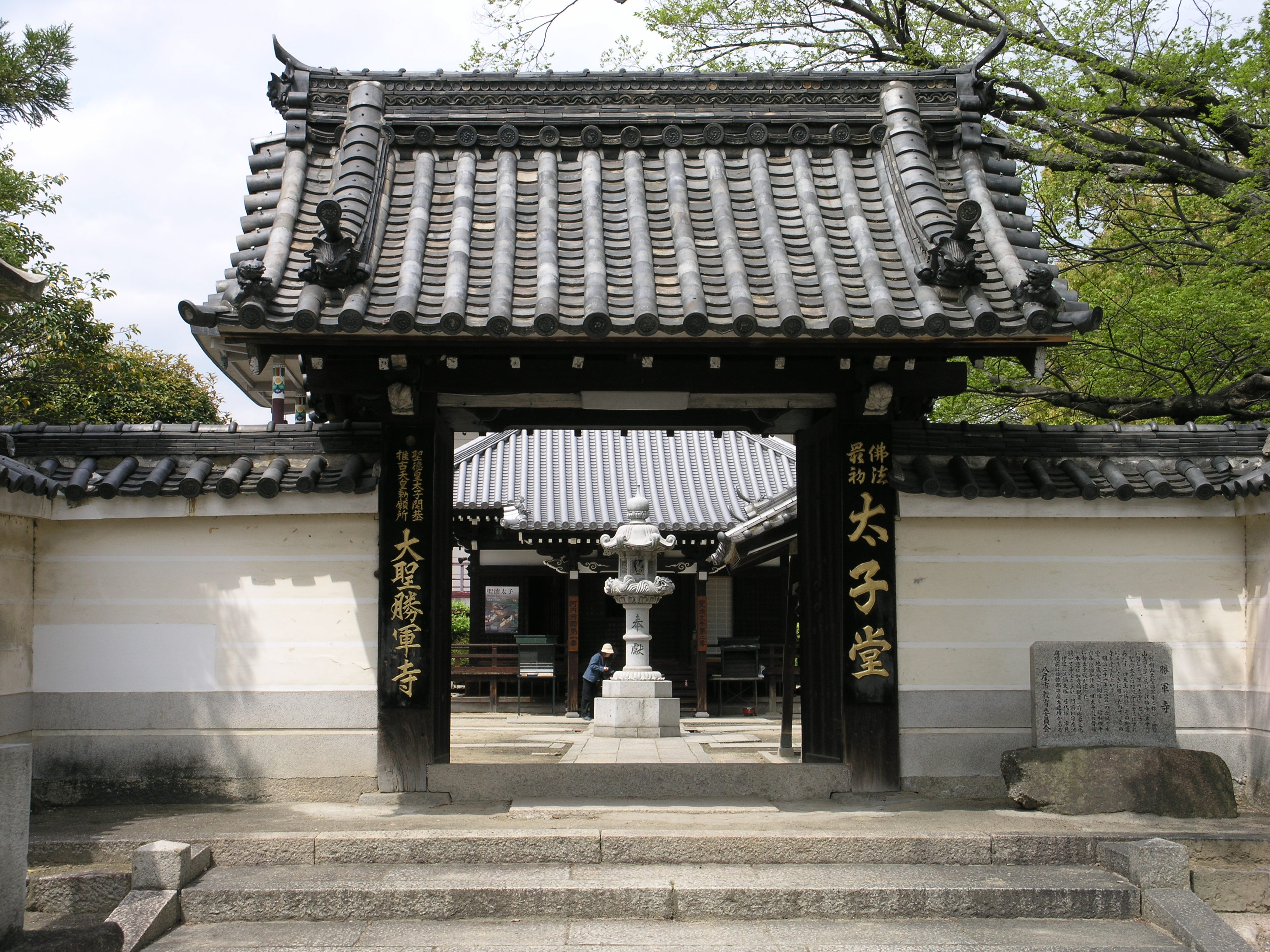 Taisei-Shōgunji in Yao, Osaka, Japan